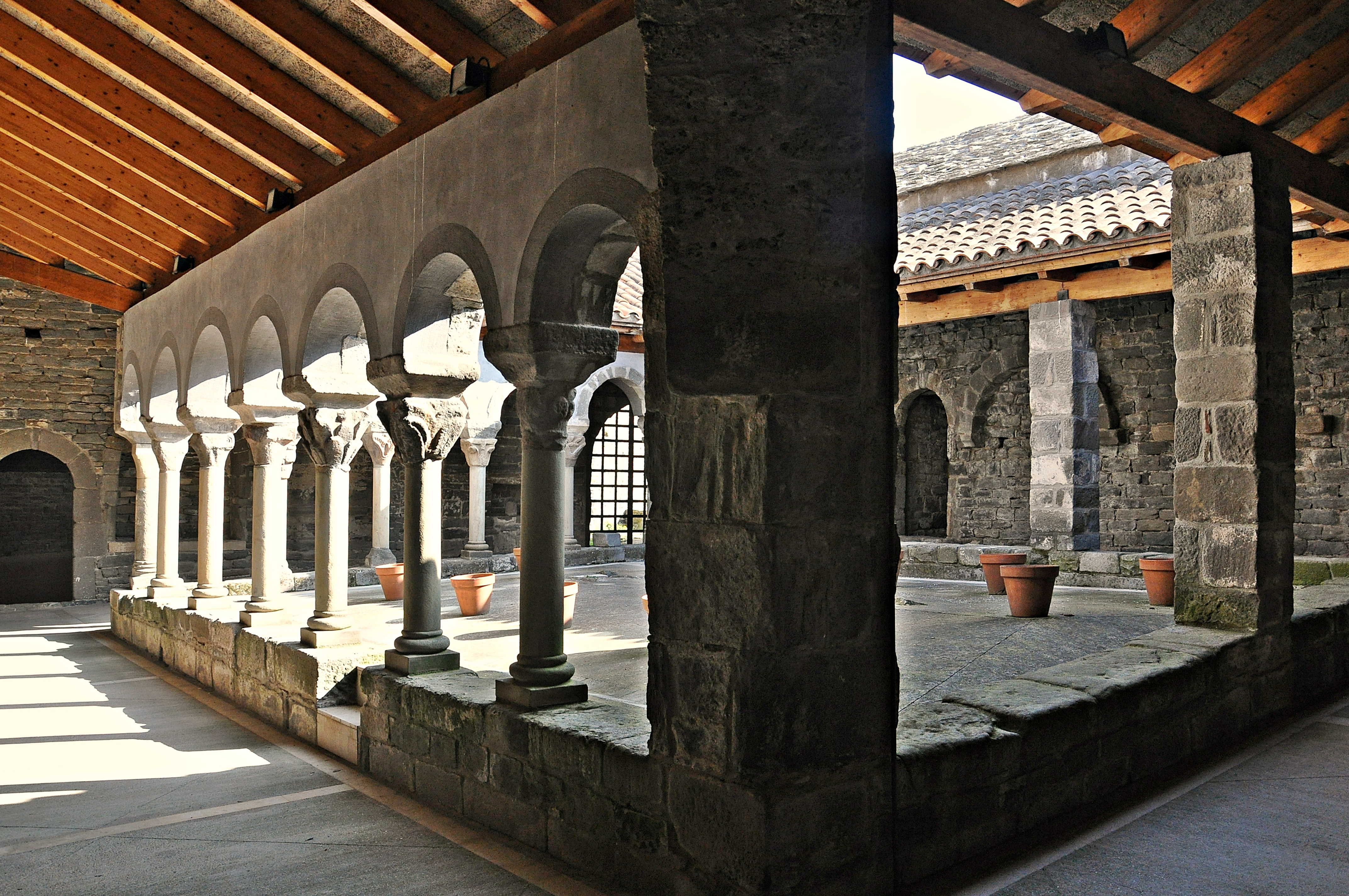 osona-cataluña